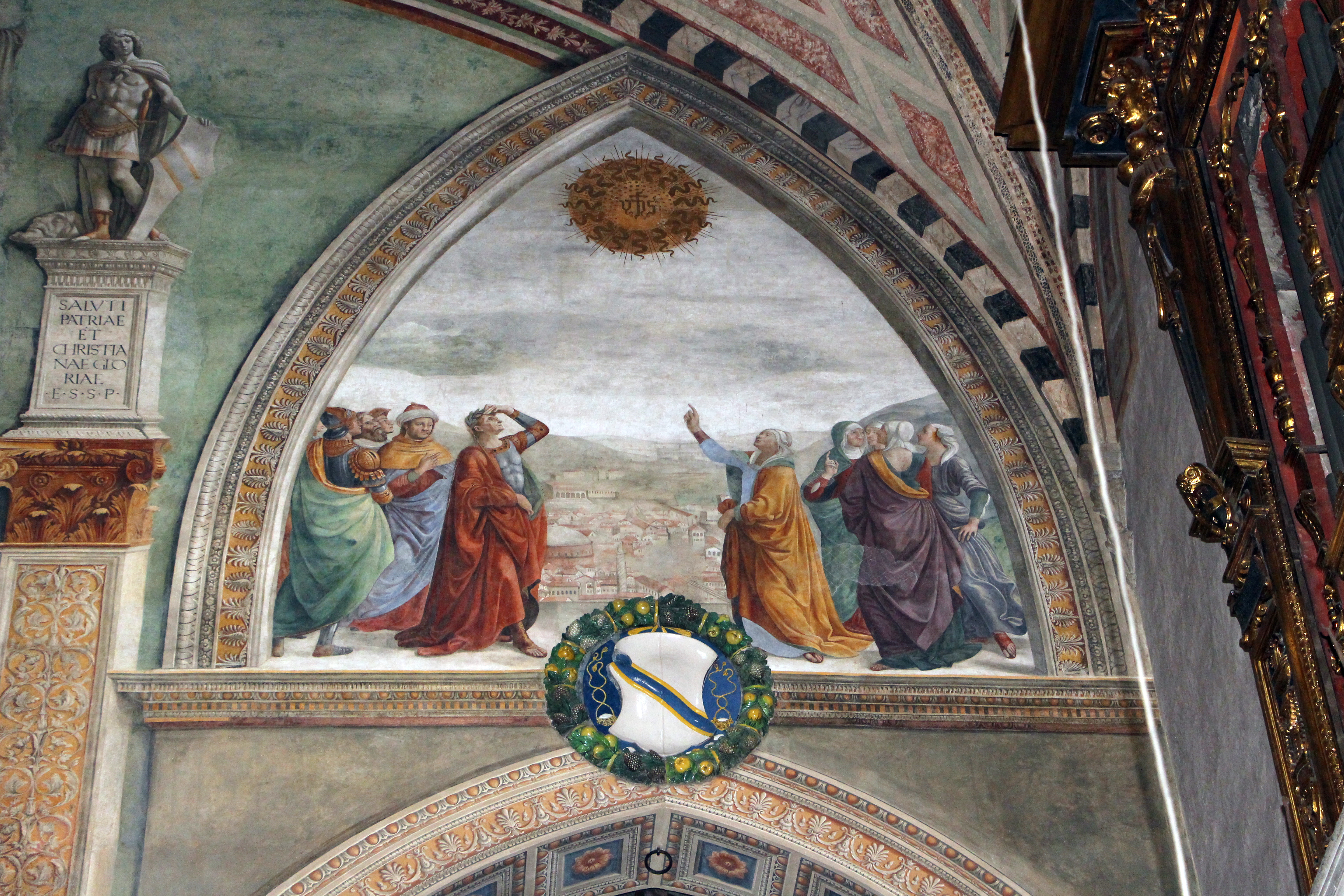 Santa Trinita (Firenze)